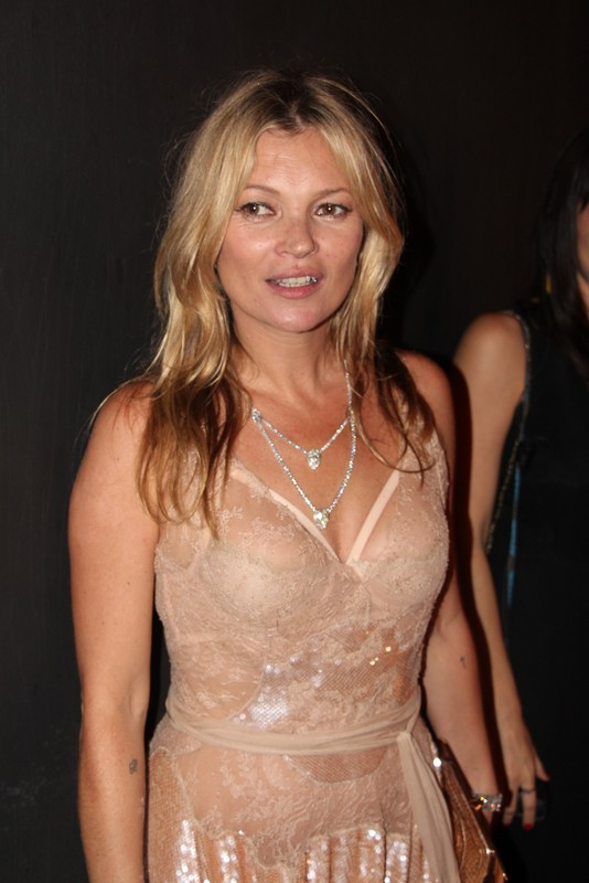 11 - Kate Moss-001